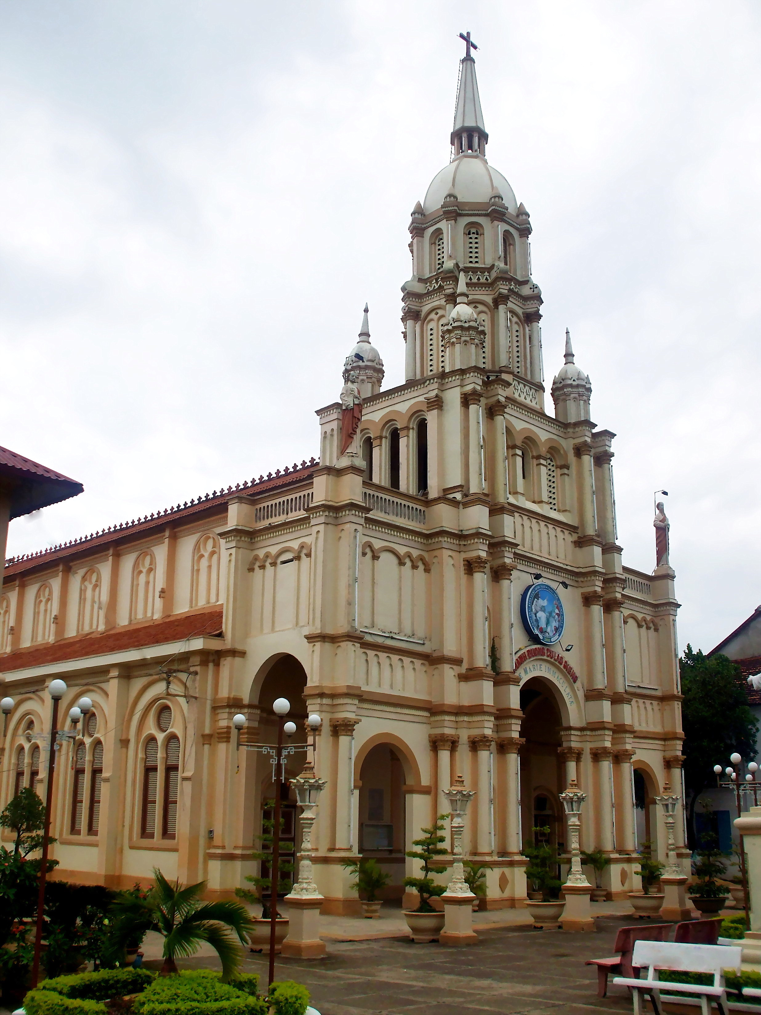 Thánh đường Cù Lao Giêng, Chợ Mới, An Giang.